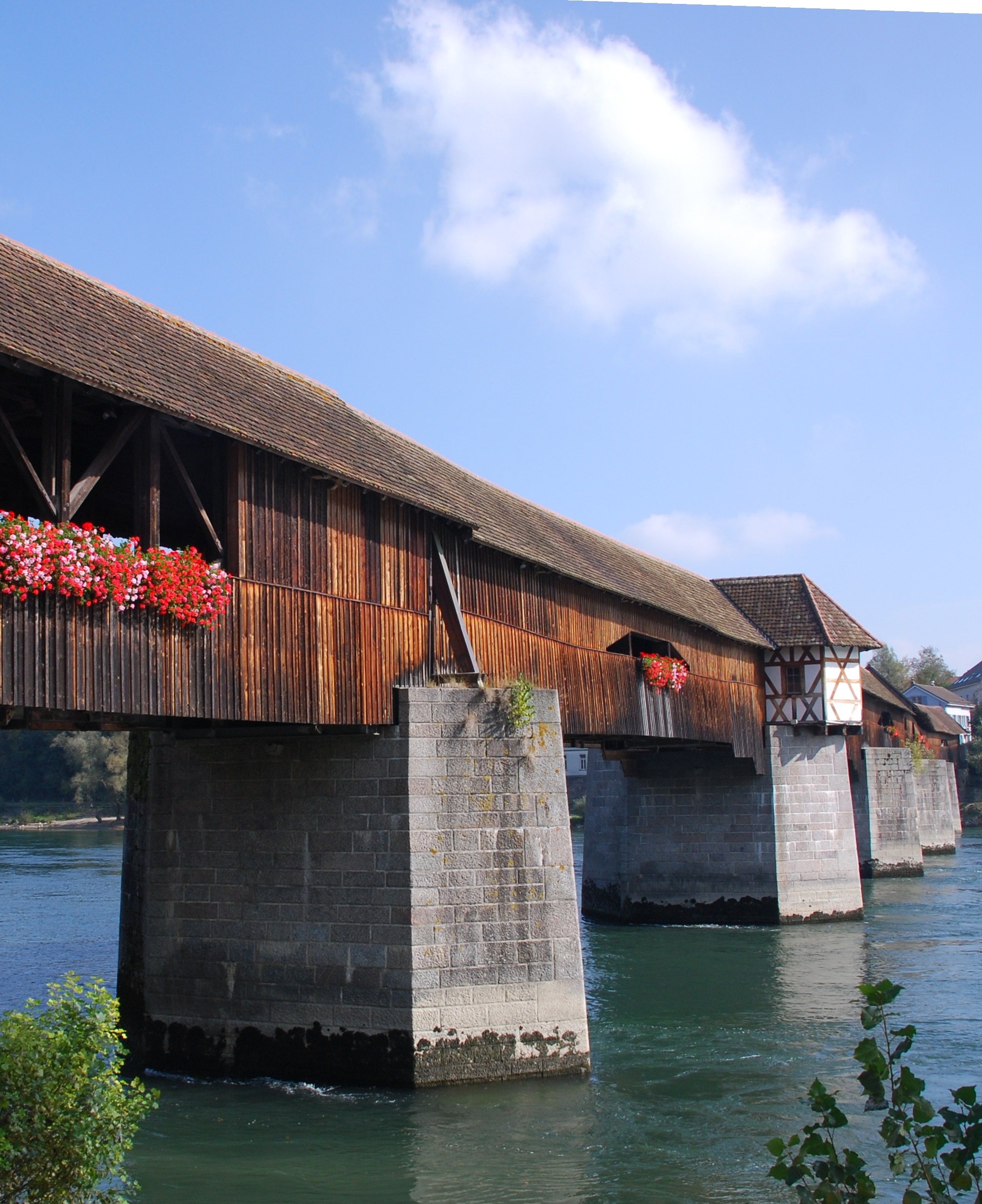 Holzbrücke Bad Säckingen, Richtung Stein (Schweiz) gesehen